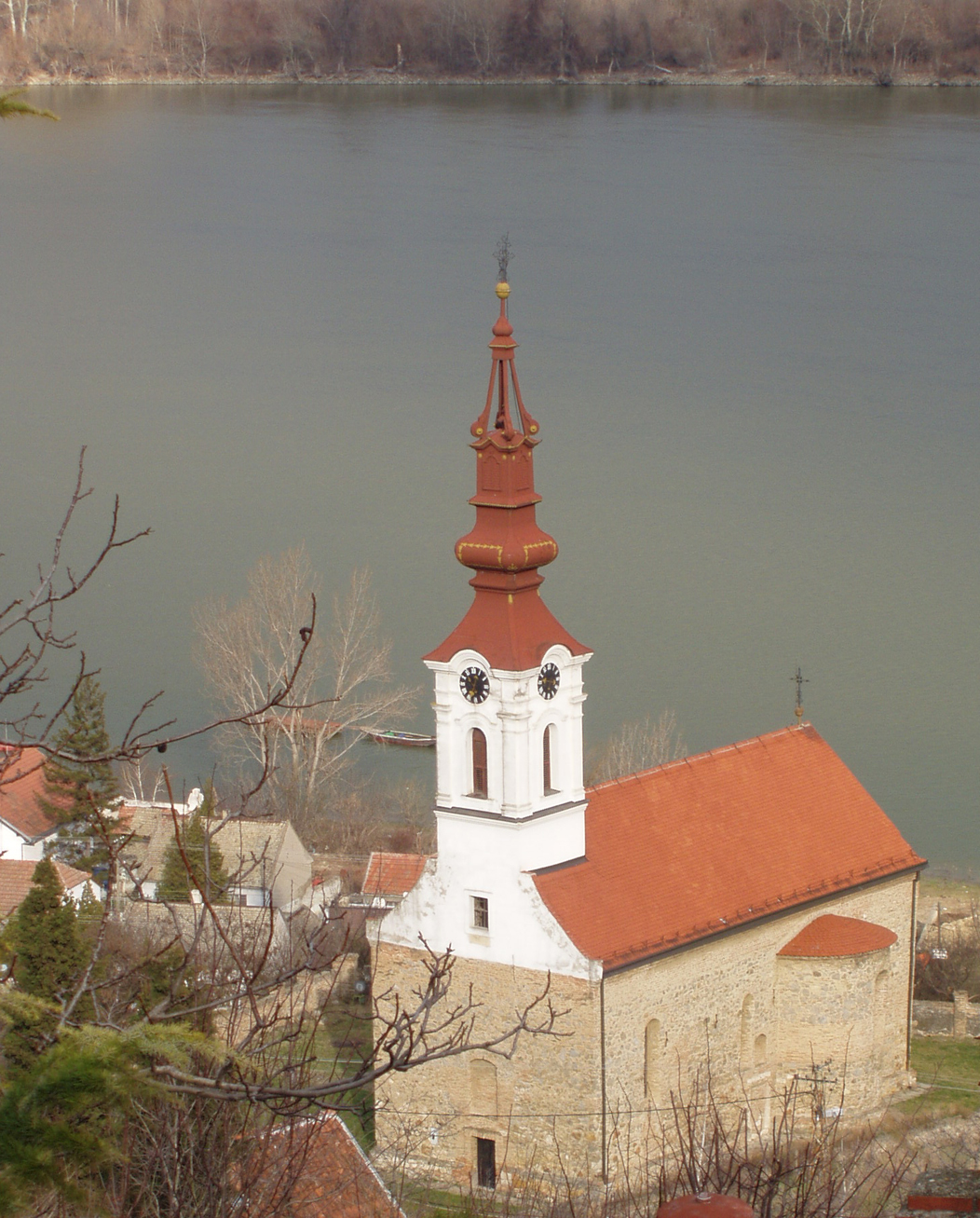 Church in (Stari) Slankamen in Vojvodina (Serbia)/L'église Saint-Nicolas de (Stari) Slankamen en Voïvodine (Serbie)